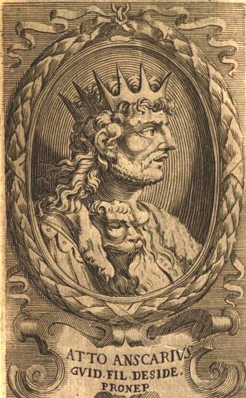 En italiano